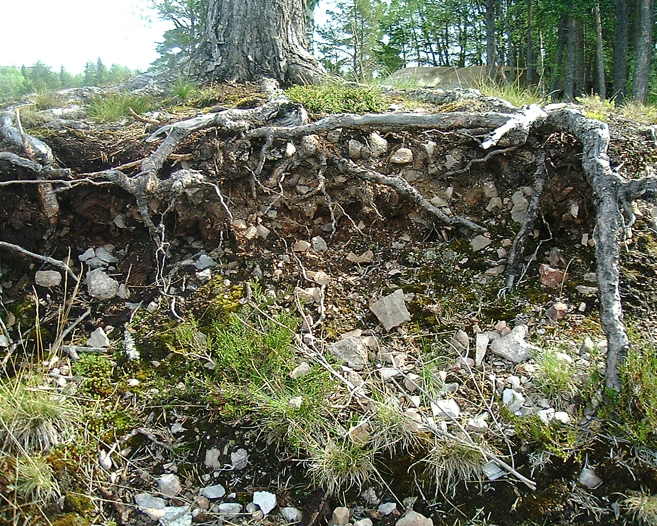 Skörbränd sten i Ulriksfors, Strömsund, Jämtland, Sverige.